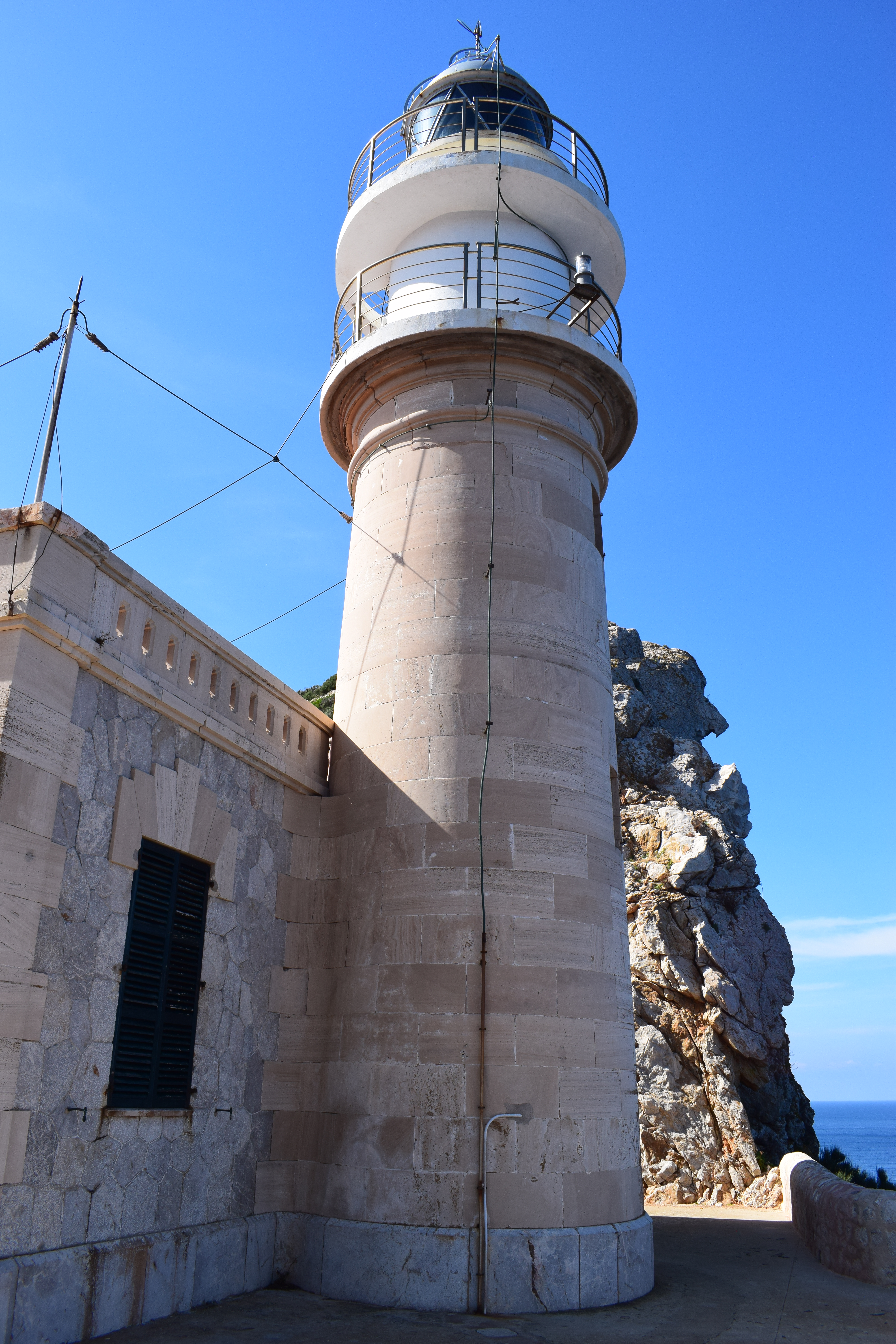 Leuchtturm Far de Tramuntana auf der Insel Sa Dragonera, Balearen, Spanien.